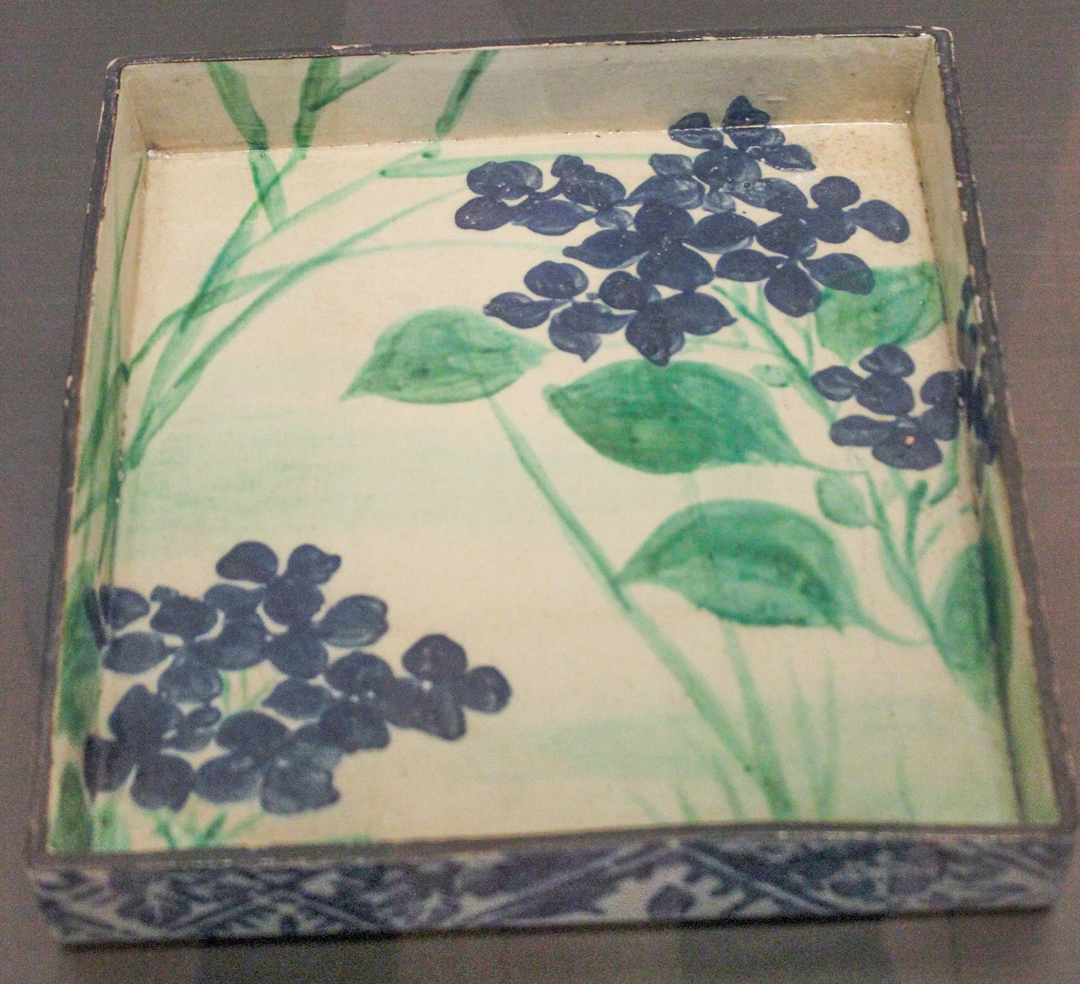 París, Musée Guimet. Cerámica de Ogata Kenzan.